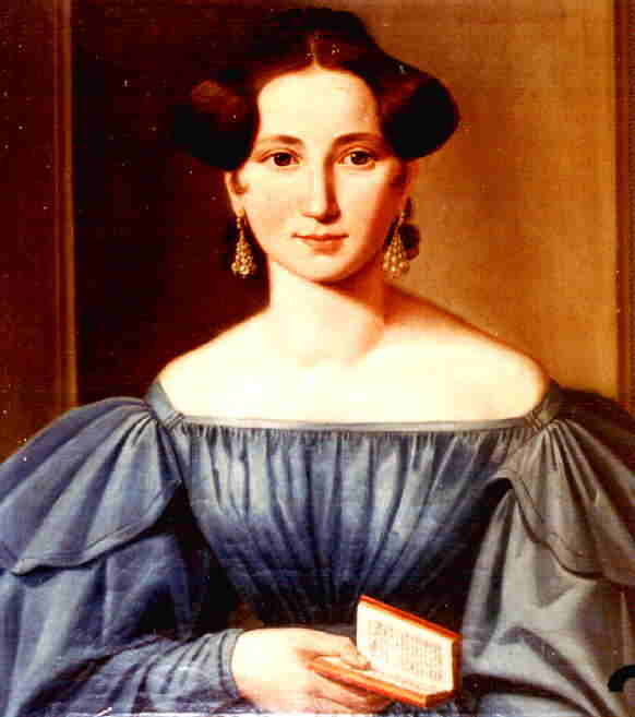 Ritratto di Emma Siegmund Herwegh (1817-1904)